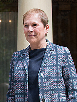 El lehendakari y la presidenta de Navarra firman un Protocolo de Colaboración entre ambas comunidades